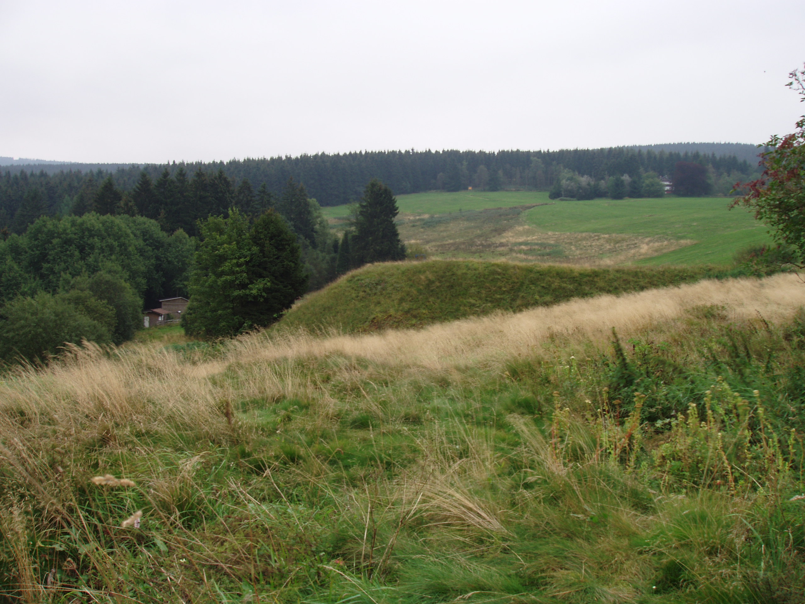 Schachthalde der Grube Rose in Altenau (Schatzkammer Gang)